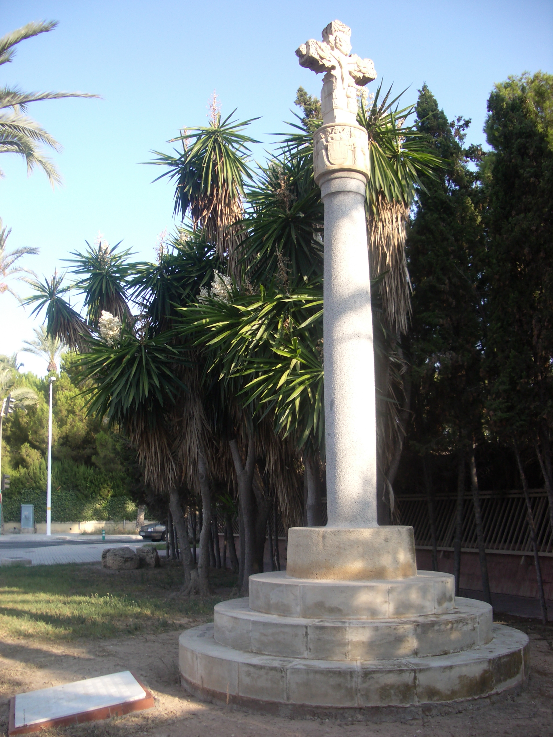 cruz de término, humilladero. Camino viejo Elche - Alicante